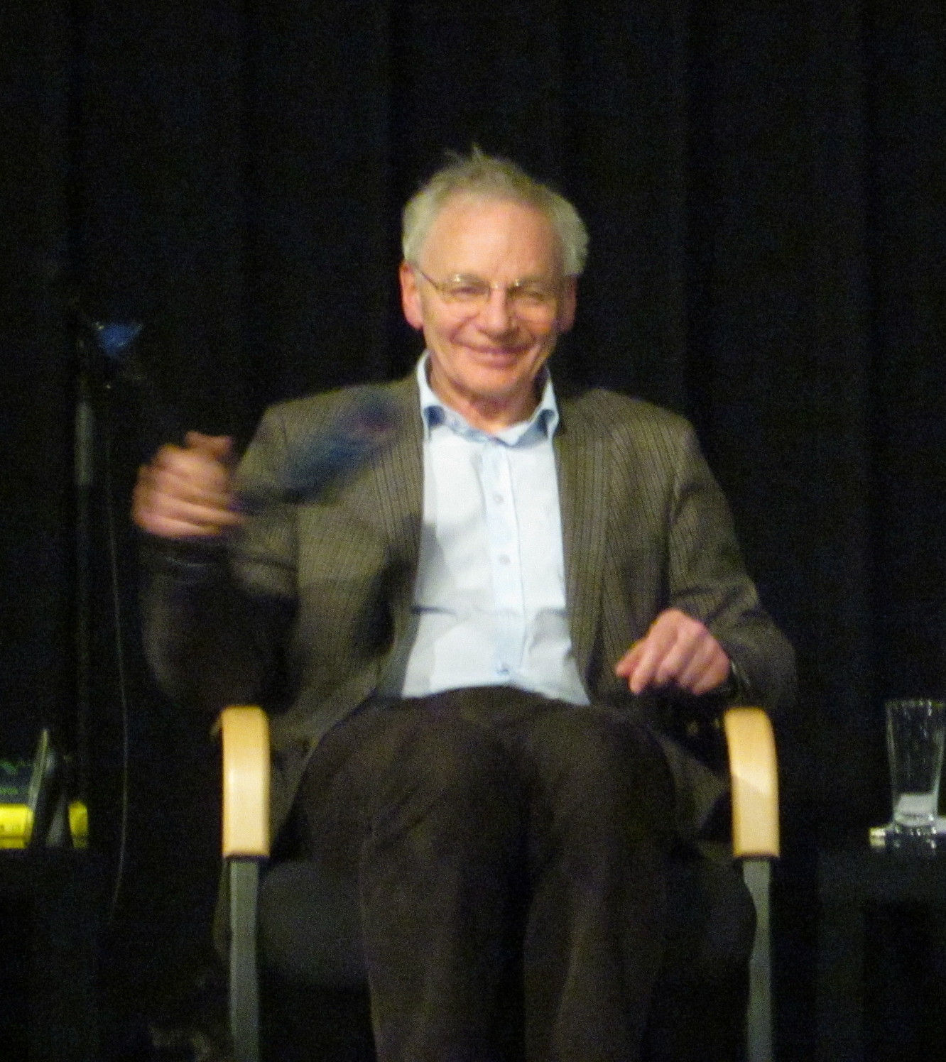 Götz Aly - Diskussion 2014